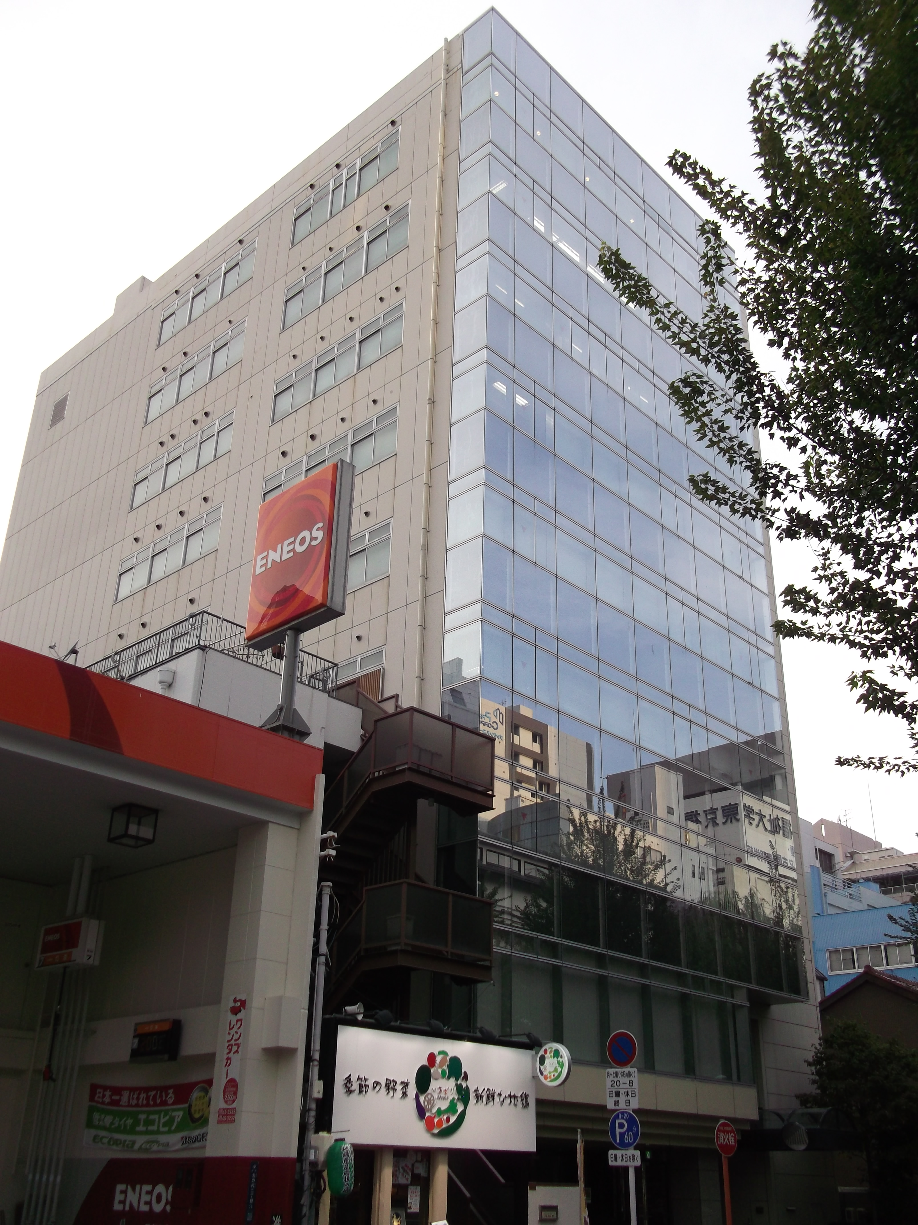 名古屋市中区のサンセイアールアンドディー本社を南側公道東側より撮影